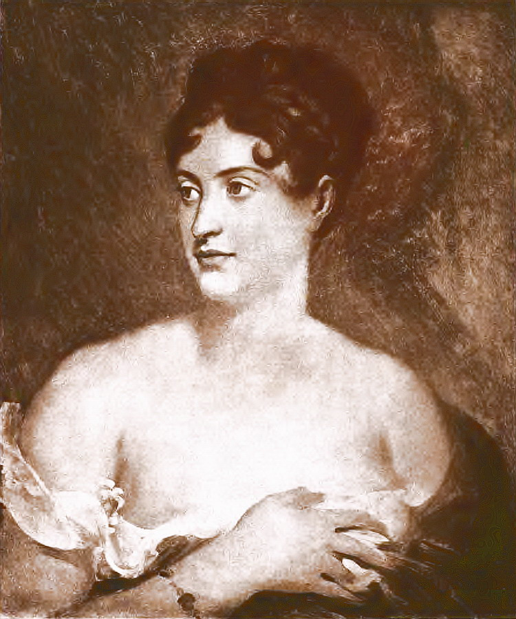 portrait de mademoiselle George d'après la toile de Gérard. Correction de défauts